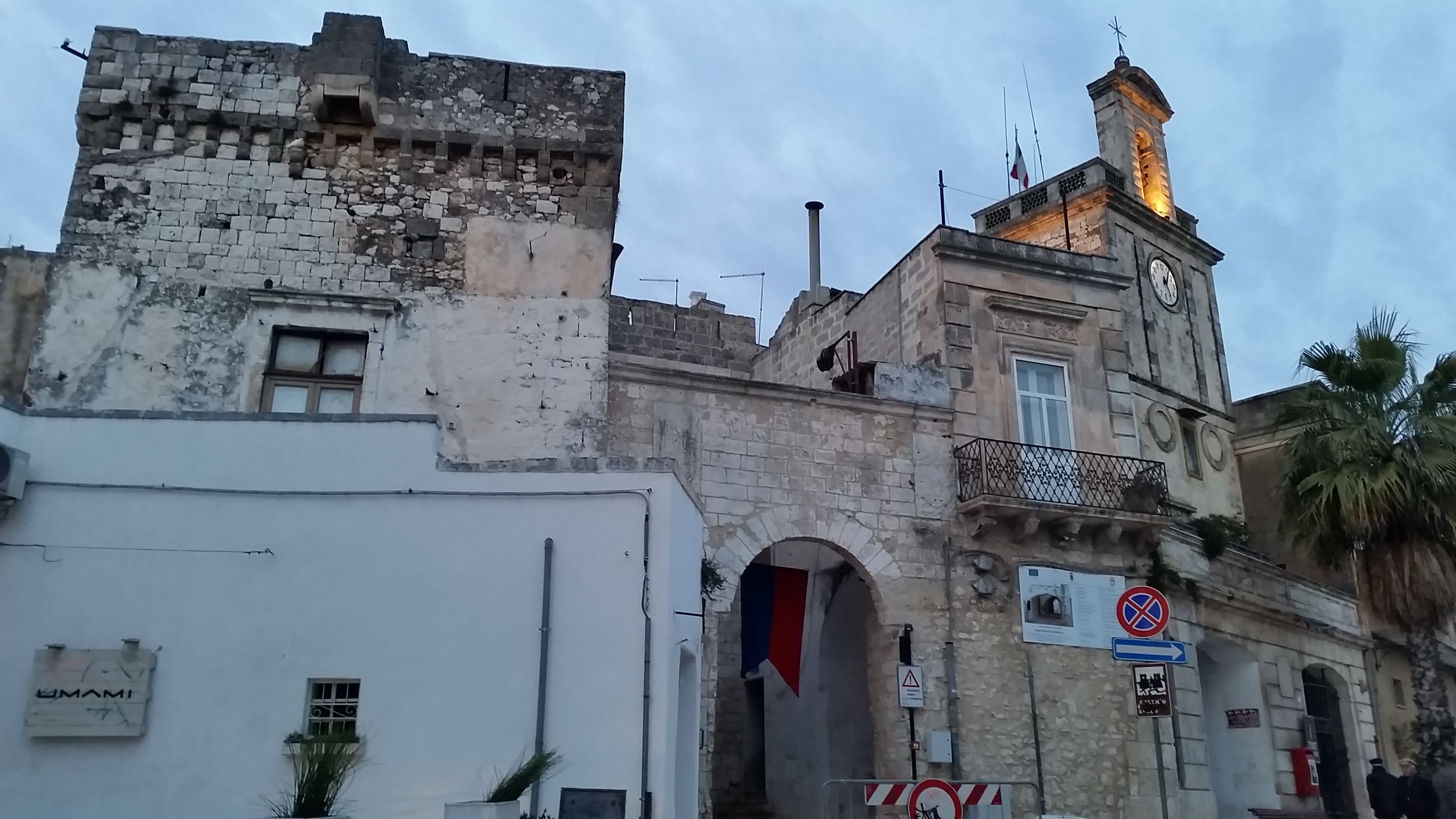 Porta Brindisi, ingresso centro storico di Carovigno